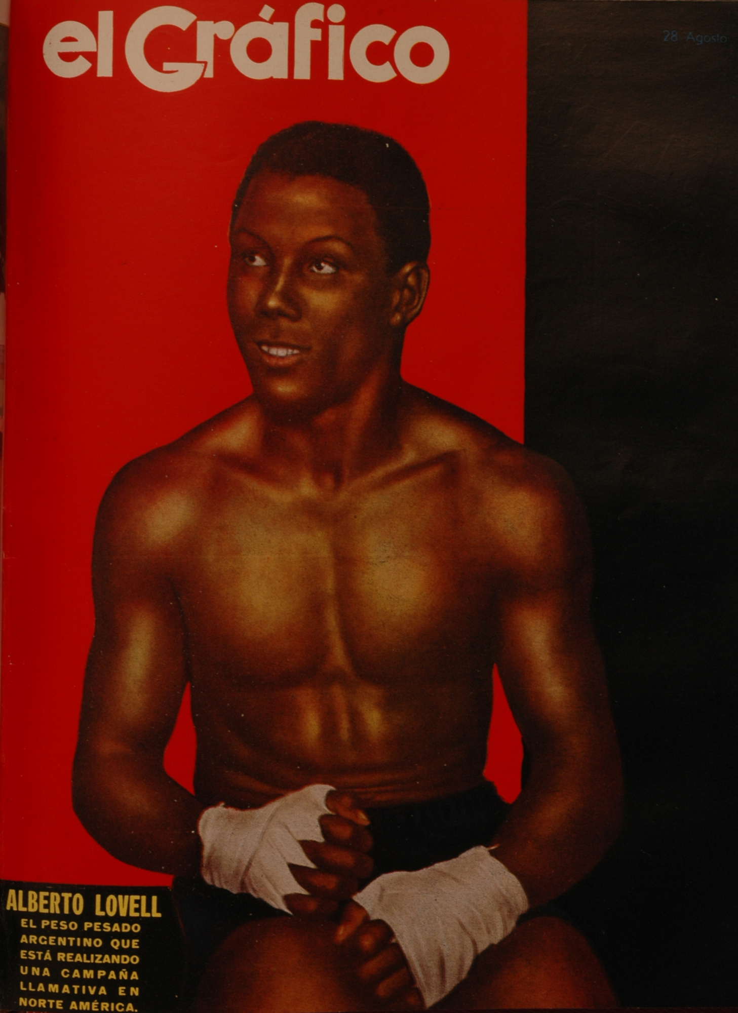 El Grafico del 28 de Agosto de 1937. Edicion 946